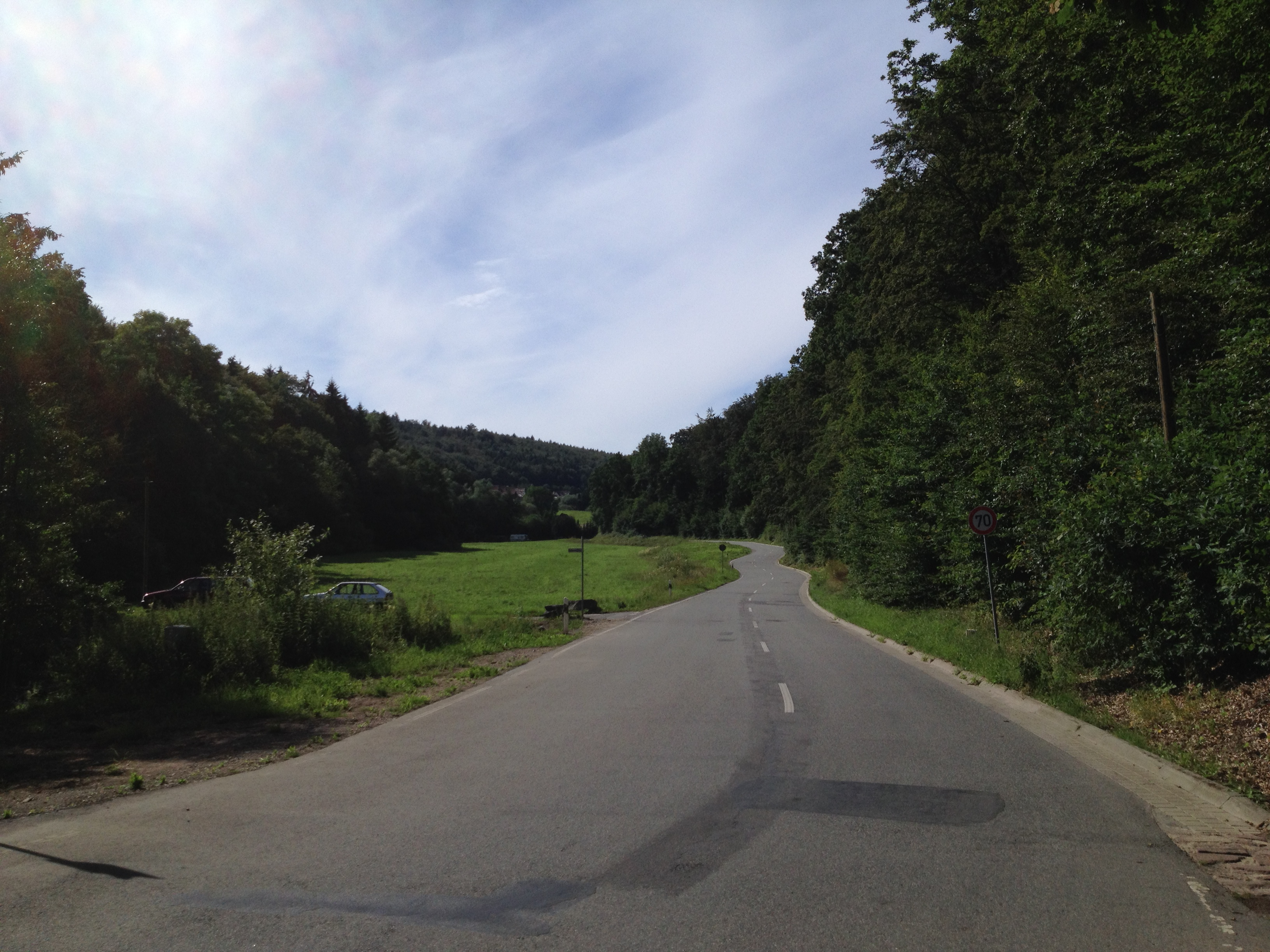 Der Märchenland-Radrundweg südwestlich von Fuldatal-Knickhagen auf der Osterbachstraße (Kreisstraße 40)